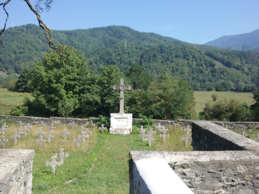 Cimitirul Eroilor din primul război mondial (1916 - 1918) localitate componentă CĂLINEȘTI; oraș Brezoi Cartierul Călinești sec. XX